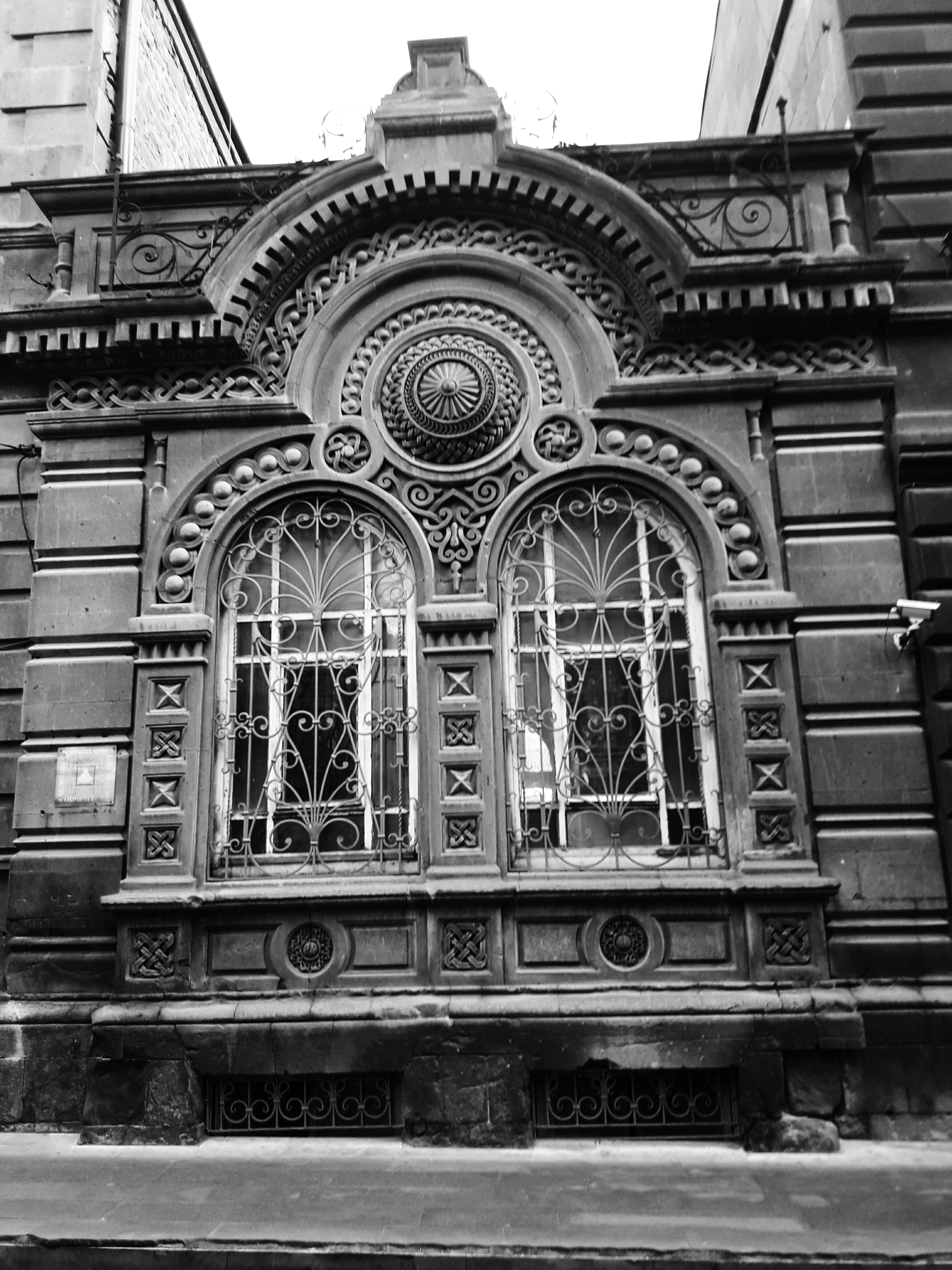 Պարսկաստանի հյուպատոսարանի շենք